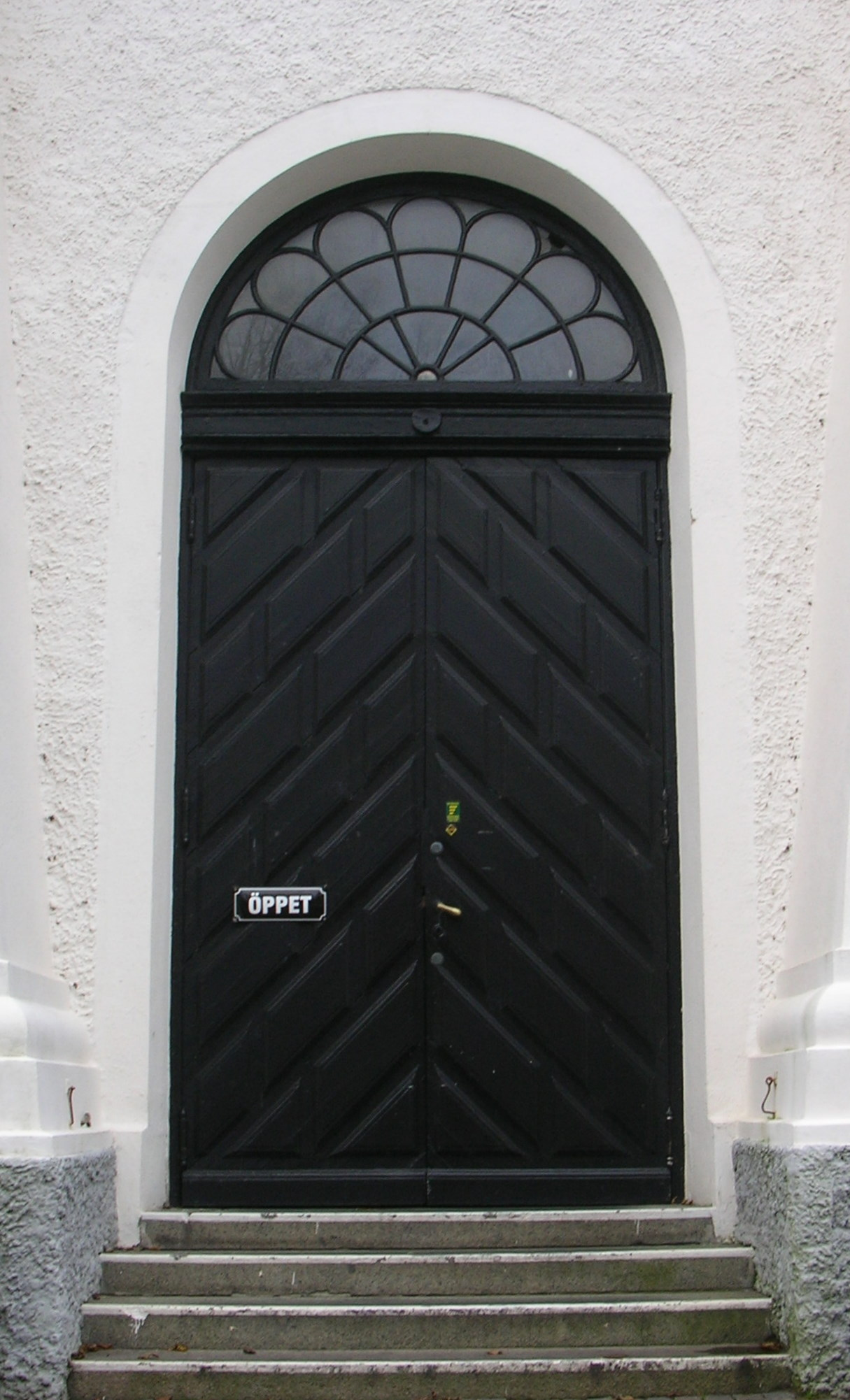 Porten till Varbergs kyrka.